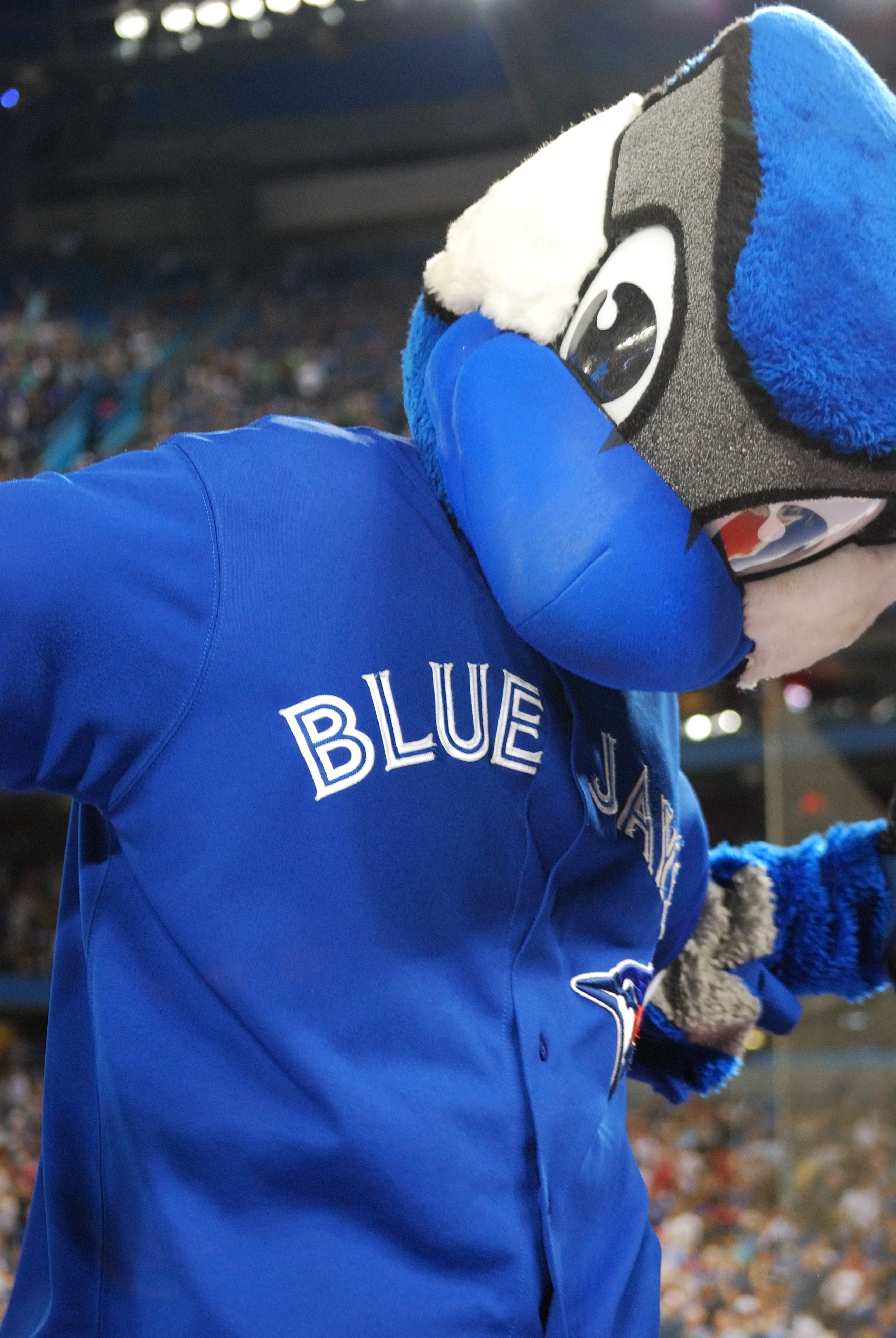 Ace